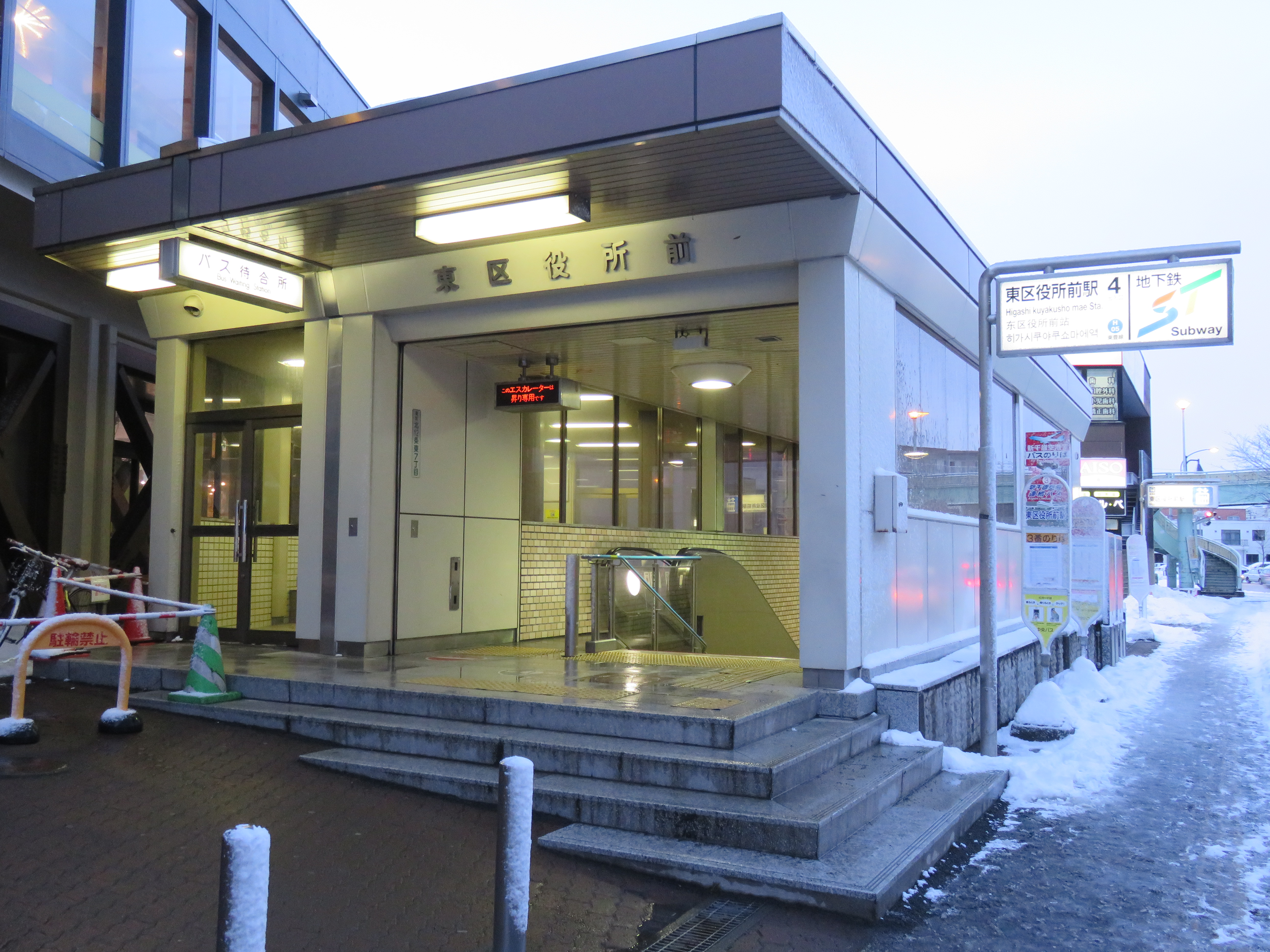 東区役所前駅4番出入口